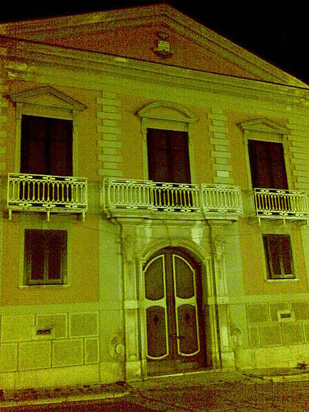 Sturno, provincia di Avellino; Facciata del Palazzo Baronale Grella.